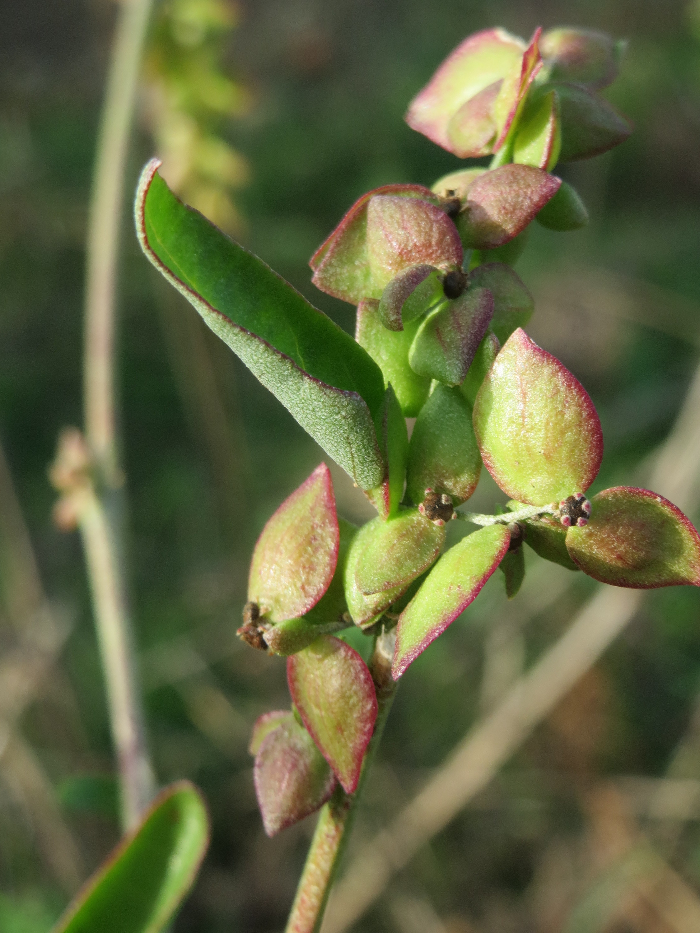 Spieß-Melde (Atriplex sagittata) in Hockenheim-Talhaus